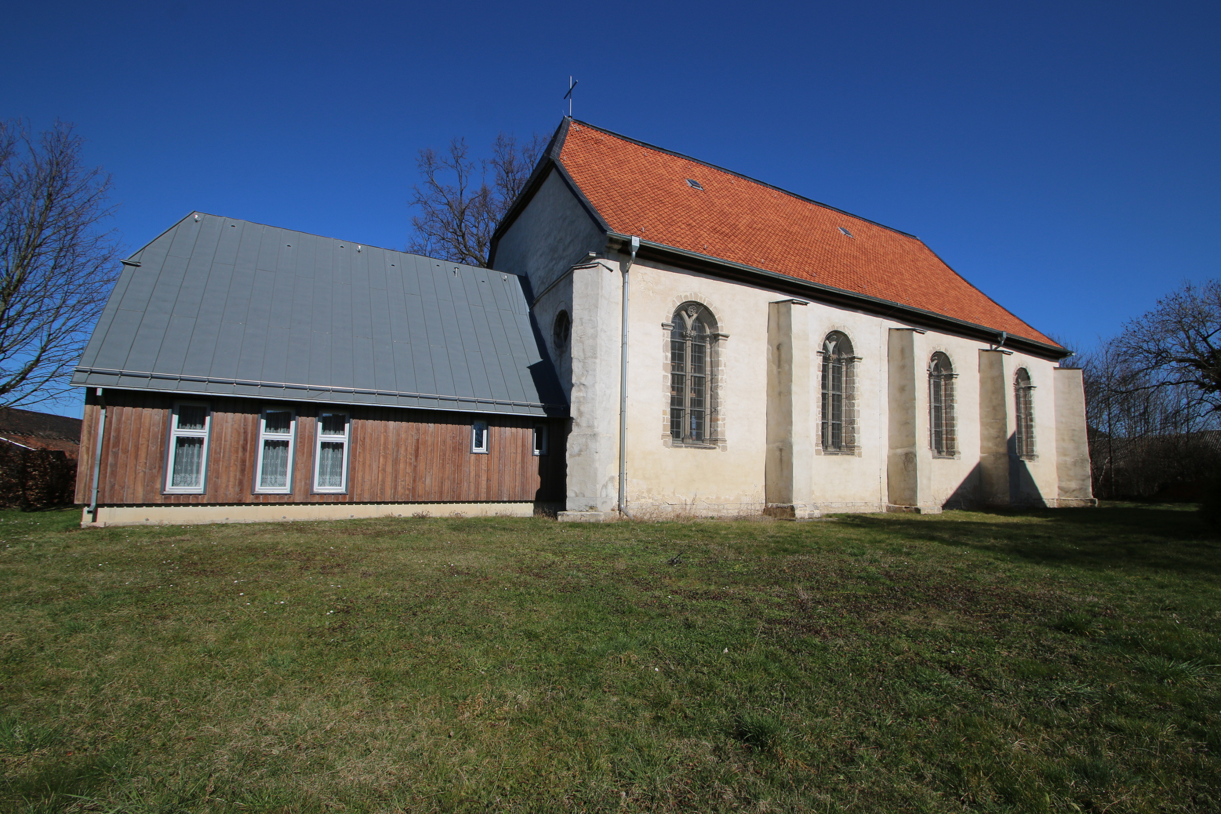 Dorfkirche in Aderstedt / Huy